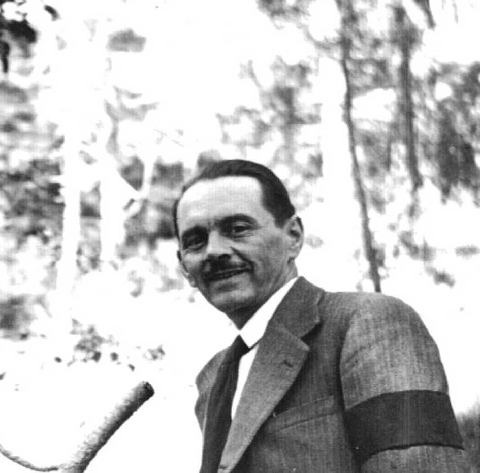 Luis Ceballos